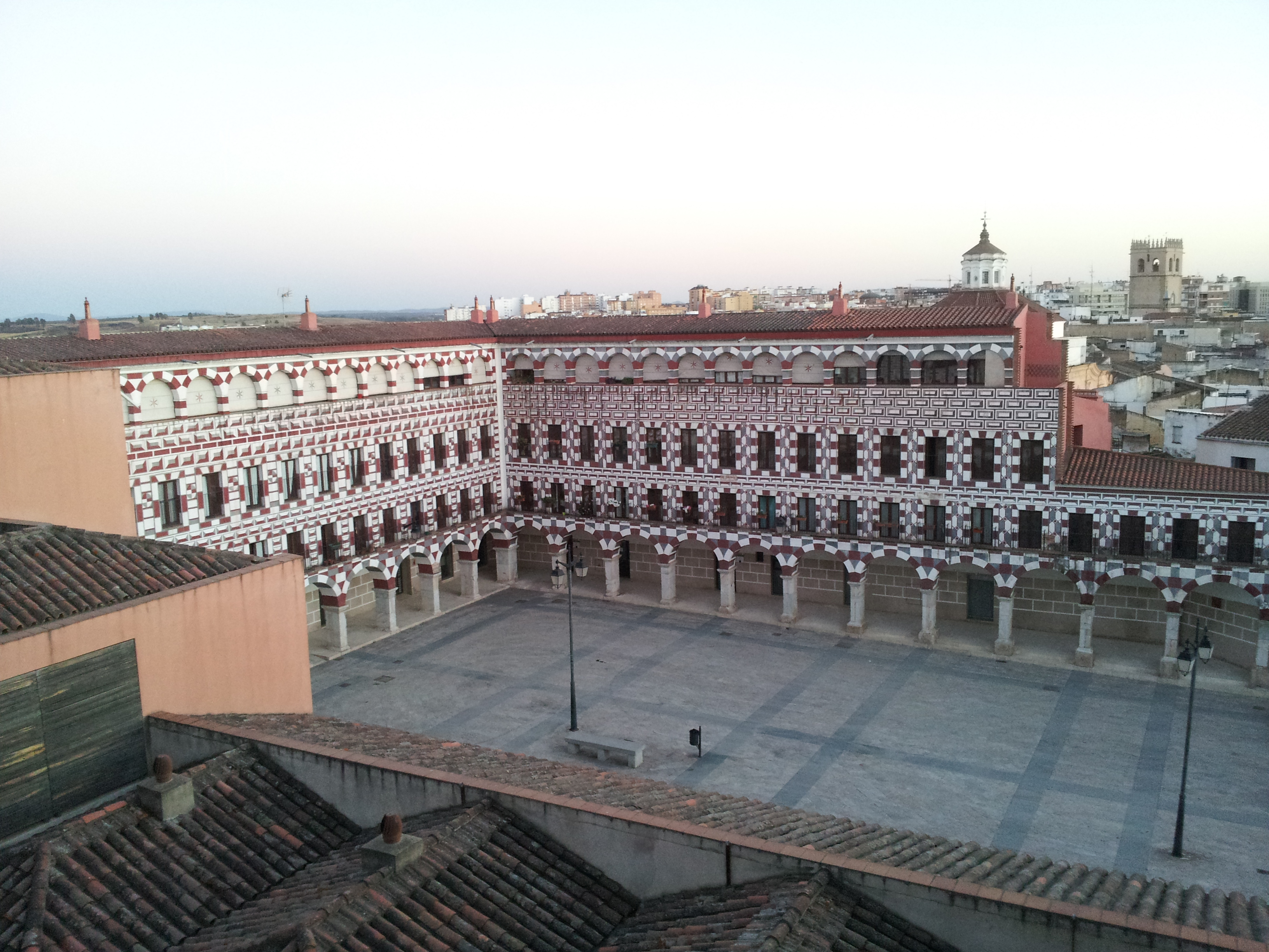 Plaza Alta de Badajoz